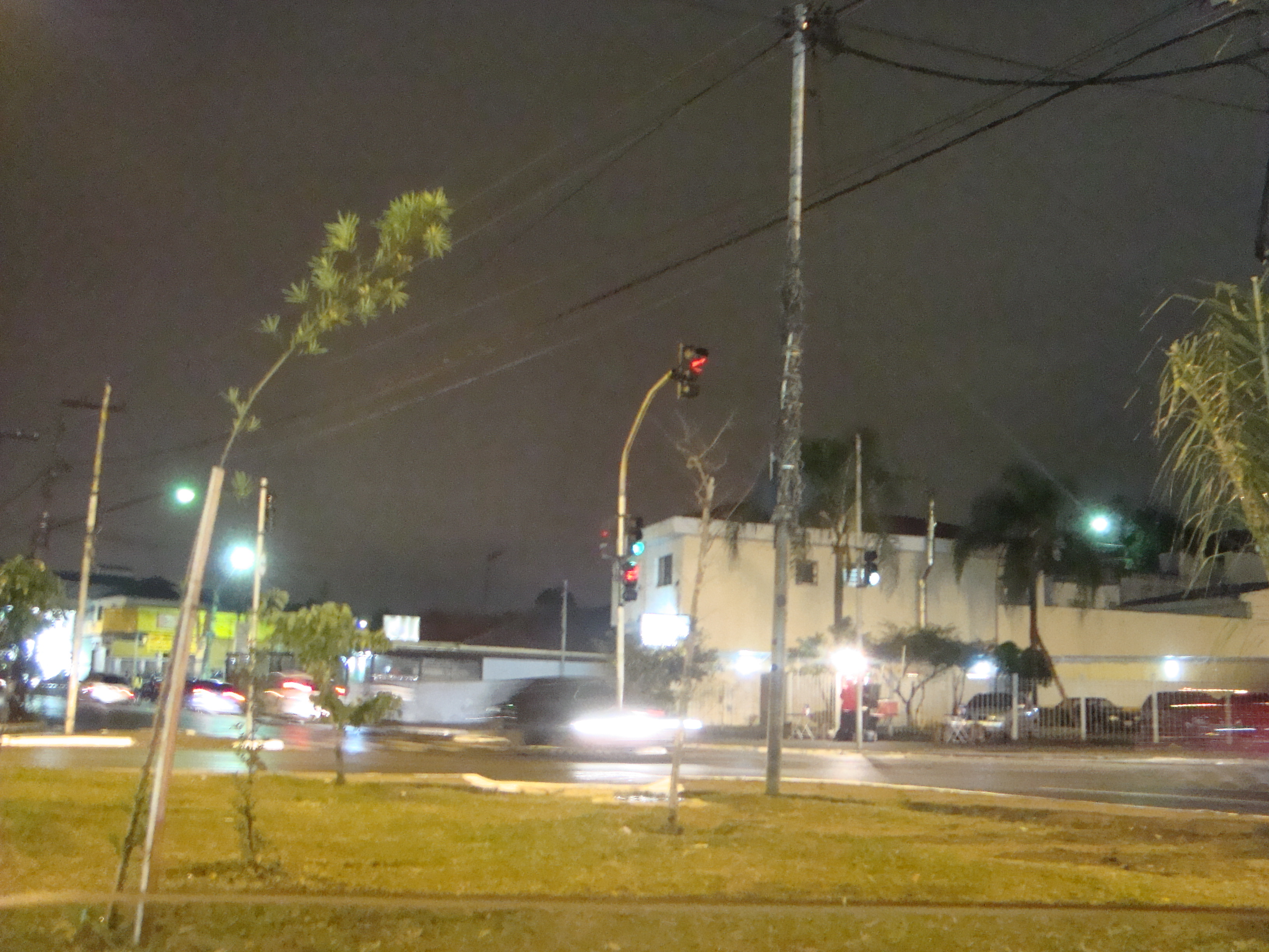 foto do cuzamento av. imirim x av. eng caetano álvares